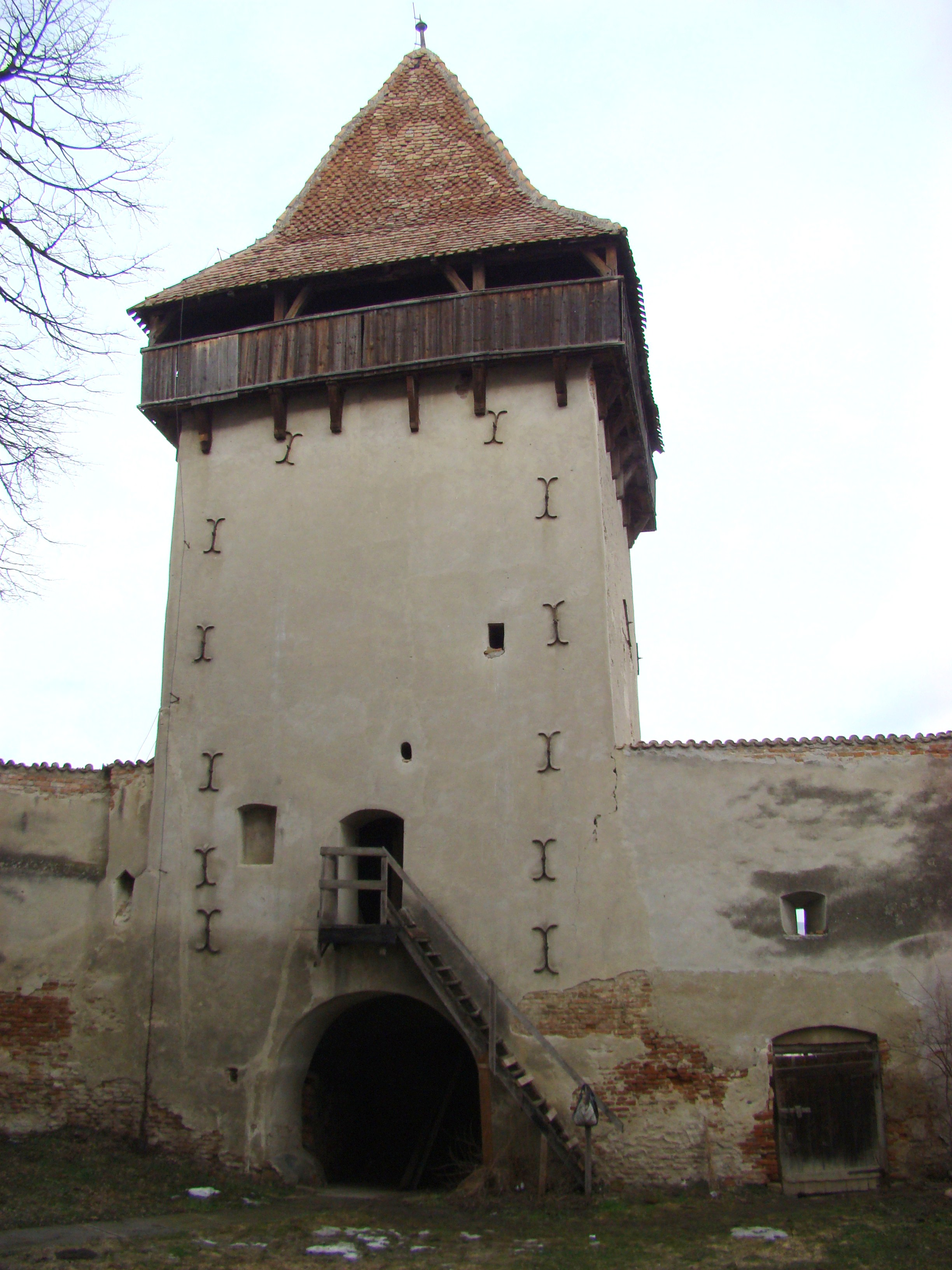 Biserica evanghelică fortificată din Boian, județul Sibiu